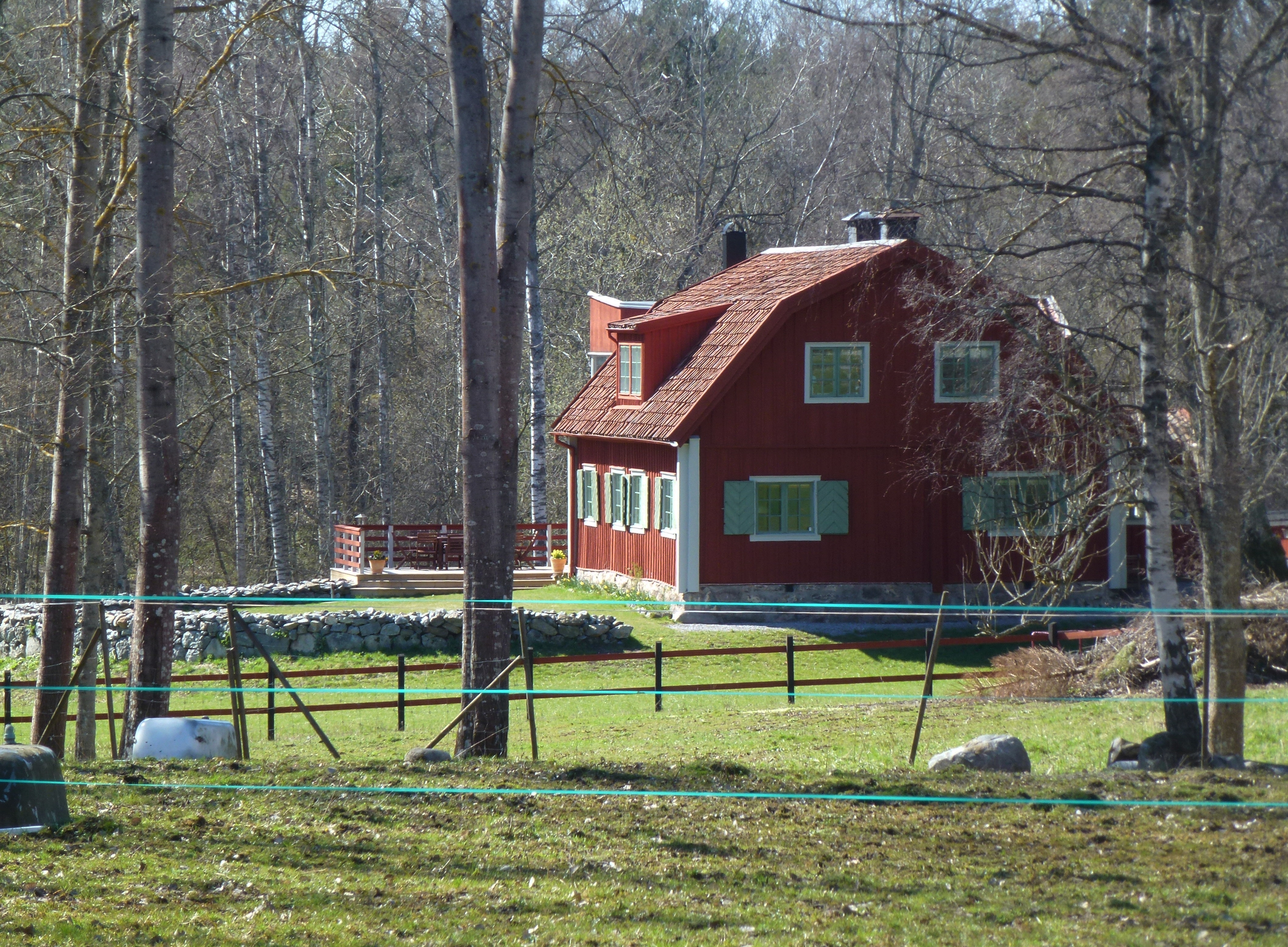 Gården Listudden vid Flaten